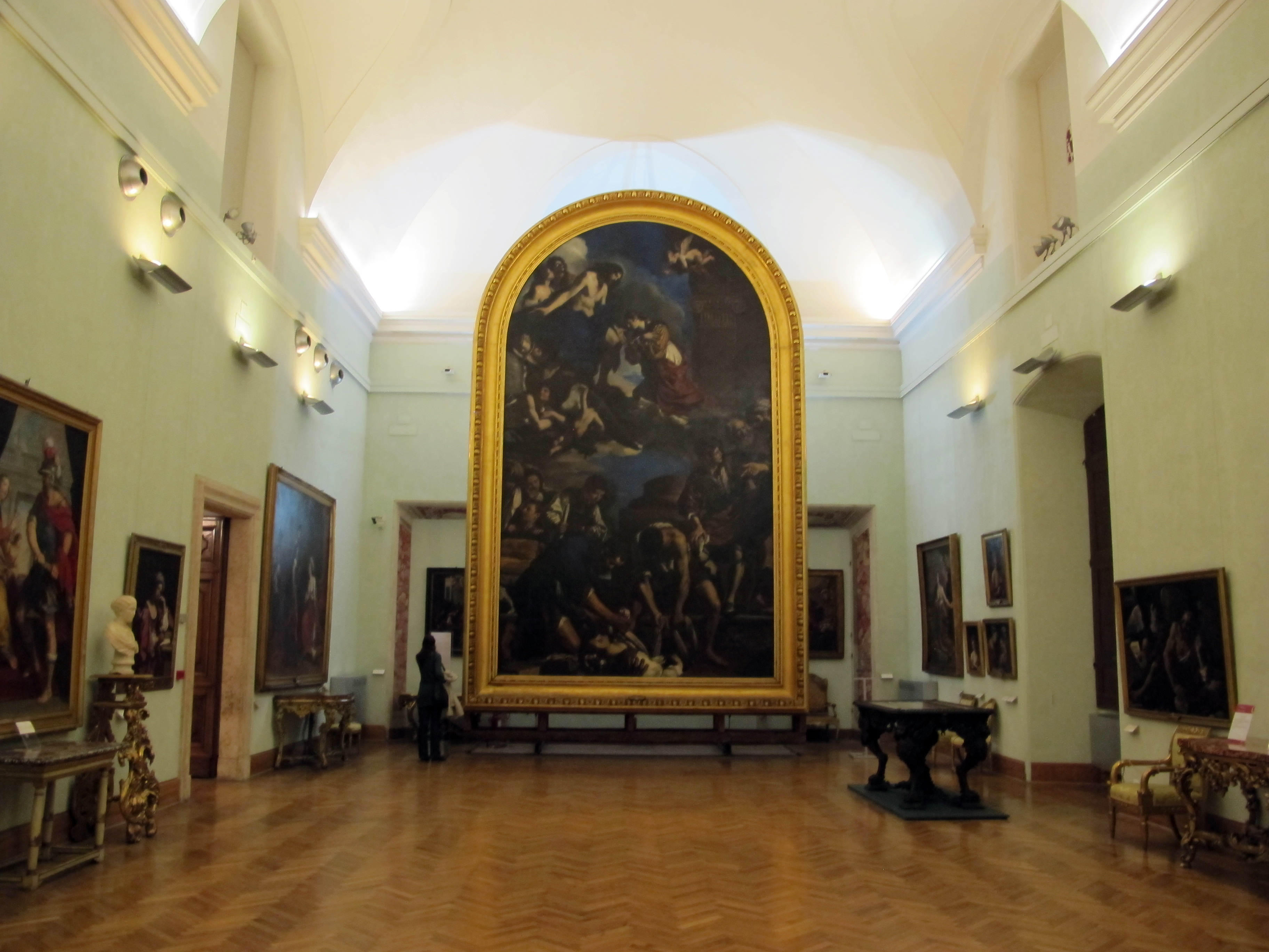 Musei Capitolini (Roma)